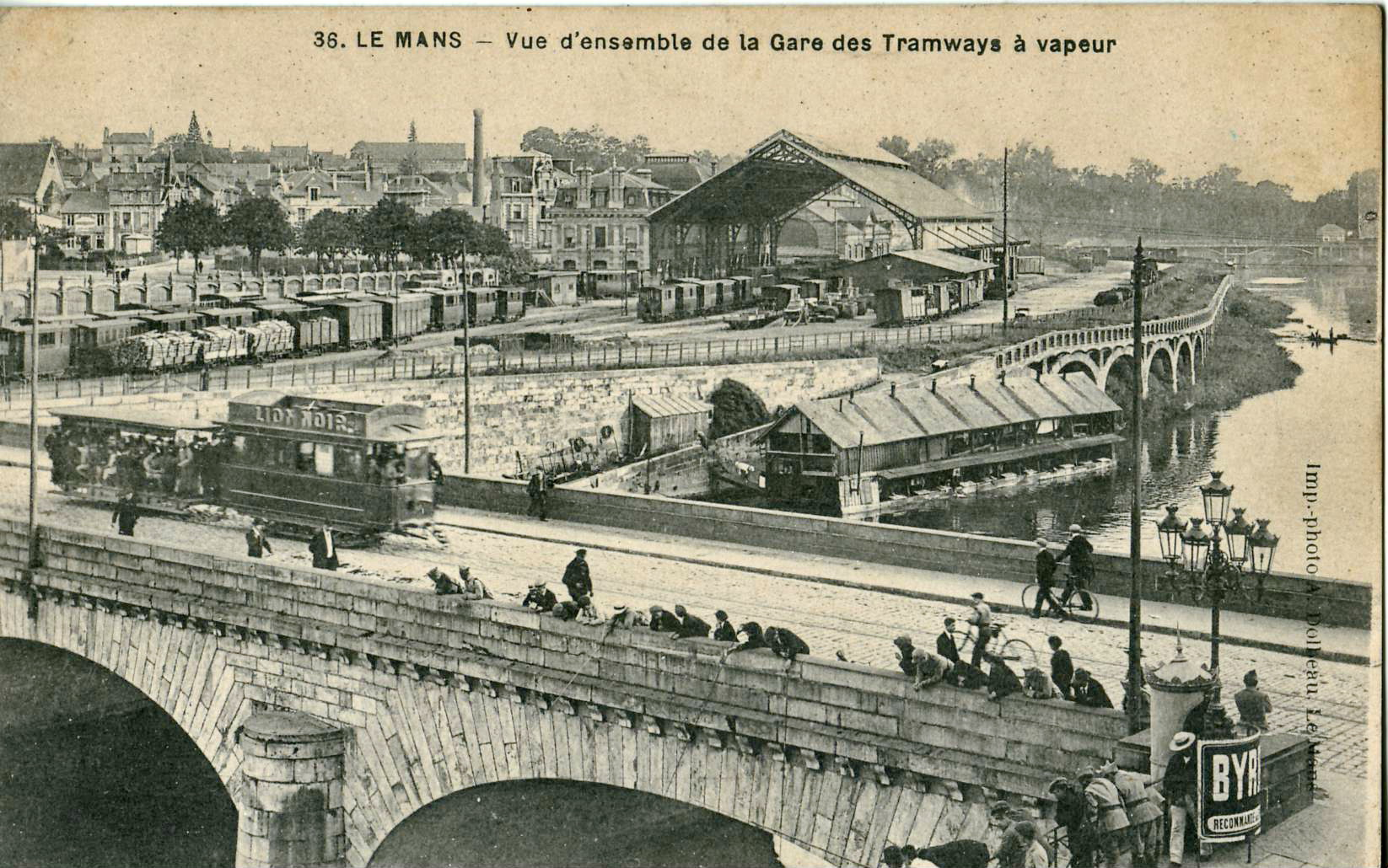 Carte postale ancienne éditée par Dolbeau au Mans, n°36 : LE MANS - Vue d'ensemble de la Gare des Tramways à vapeur